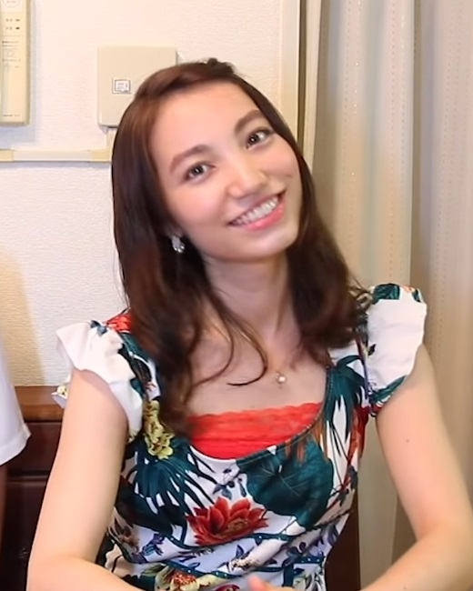 渡邉聖斗のYouTube動画に出演した加藤ジーナ